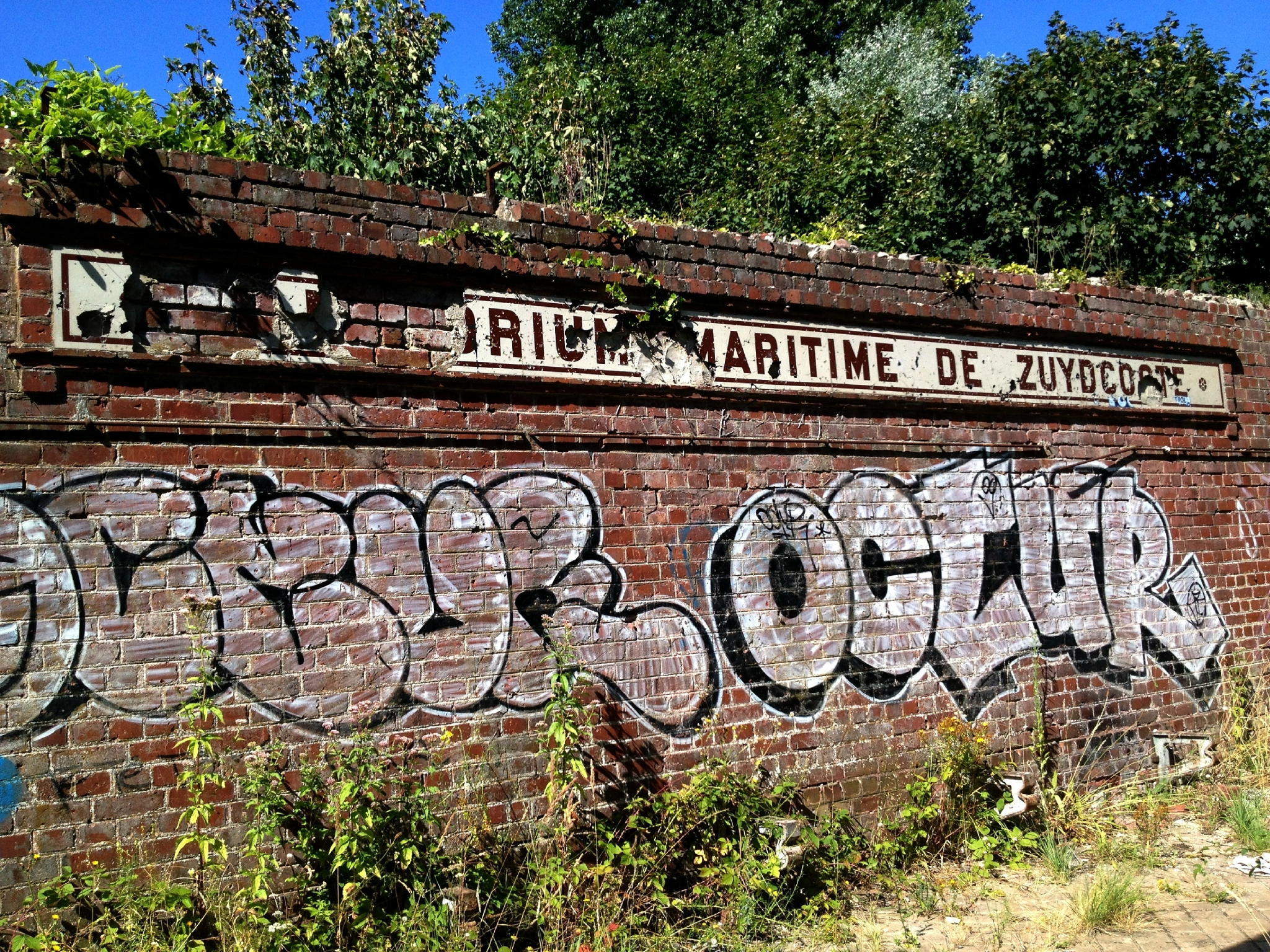 Mur portant le nom de l'ancienne halte ferroviaire partiellement abîmé On peut y lire "Sanatorium Maritime de Zuydcoote"